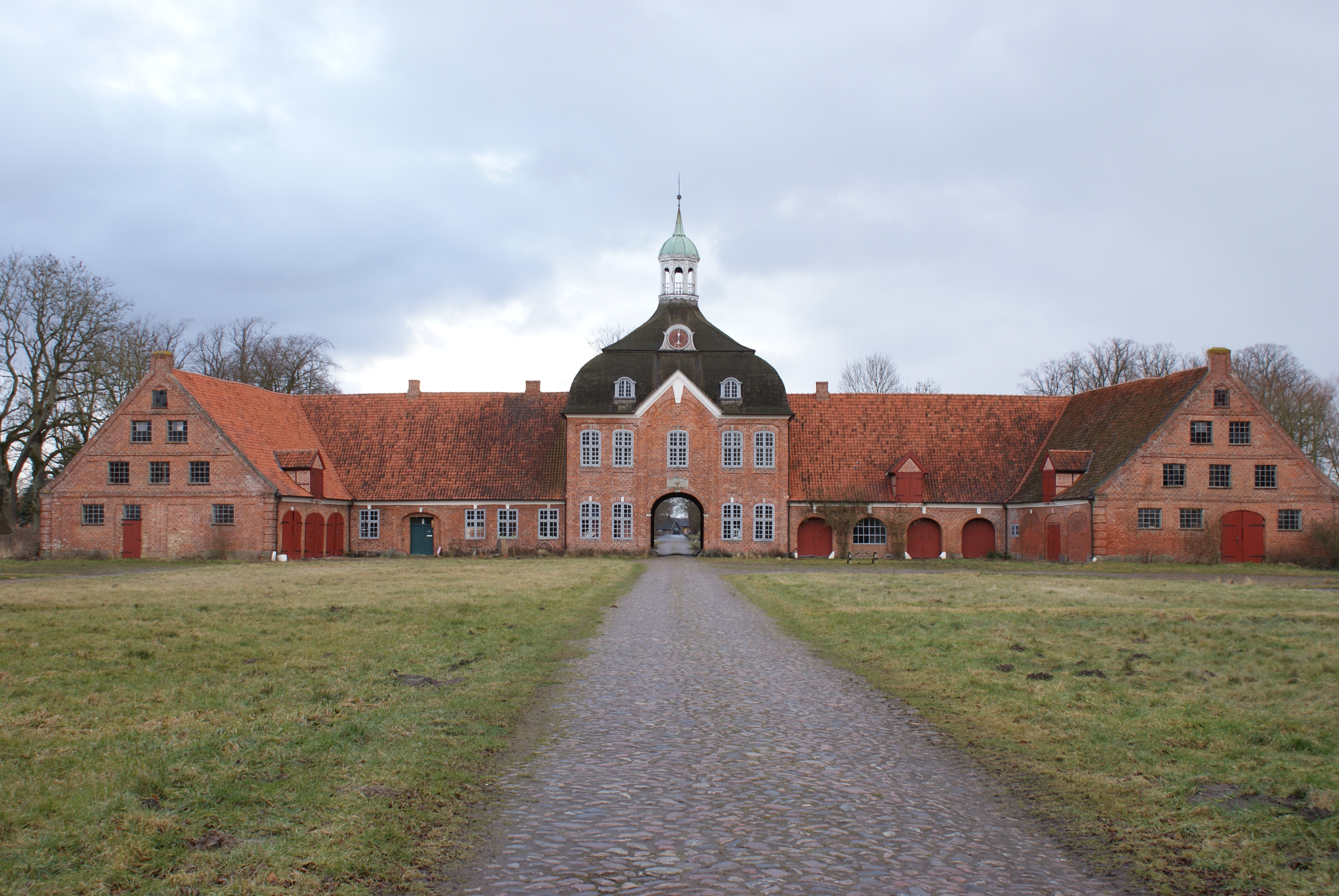 Rueckseite Torhaus Gut Hasselburg